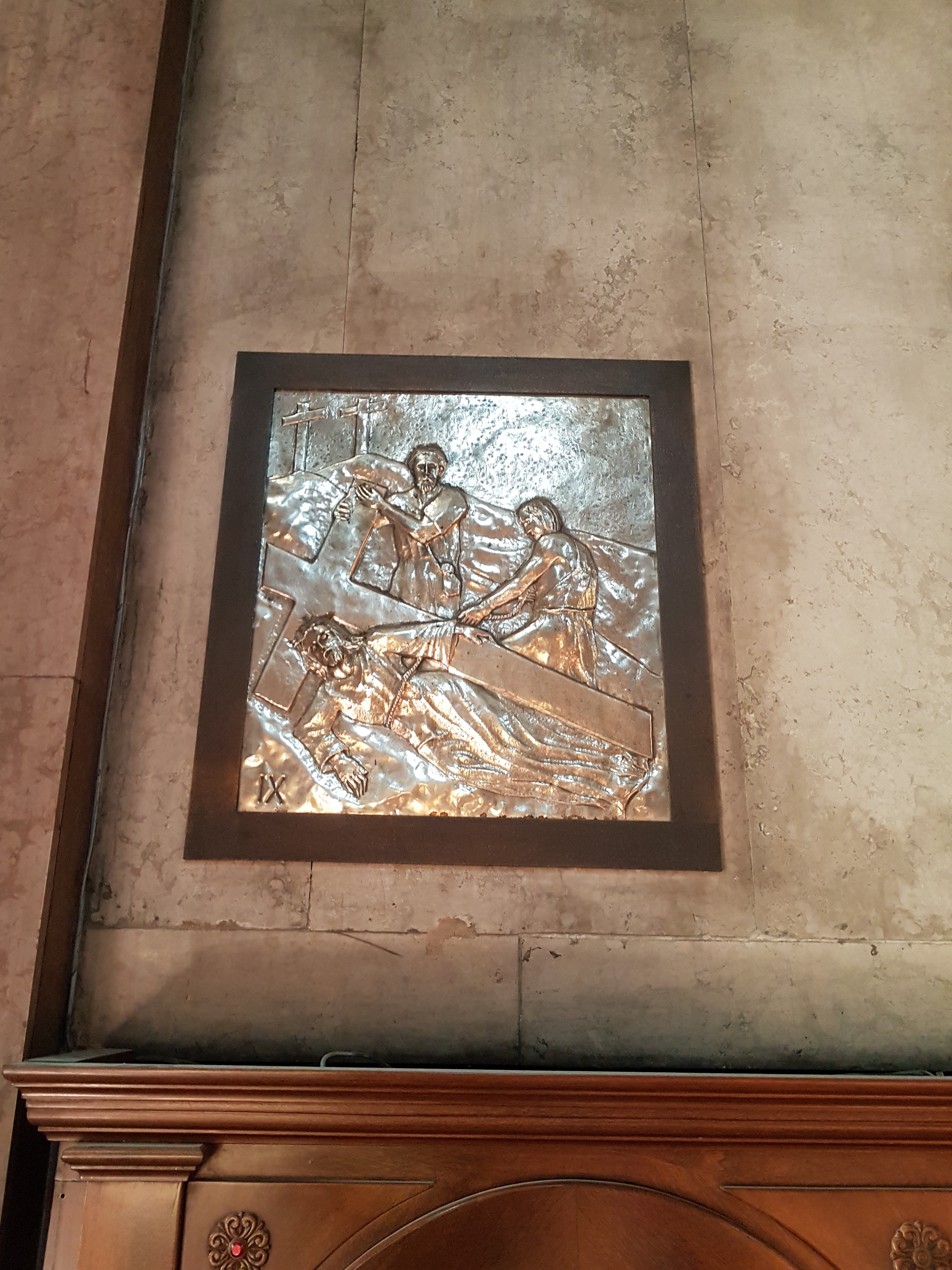 Stations of the Cross in Madonna dell'Angelo (Caorle)